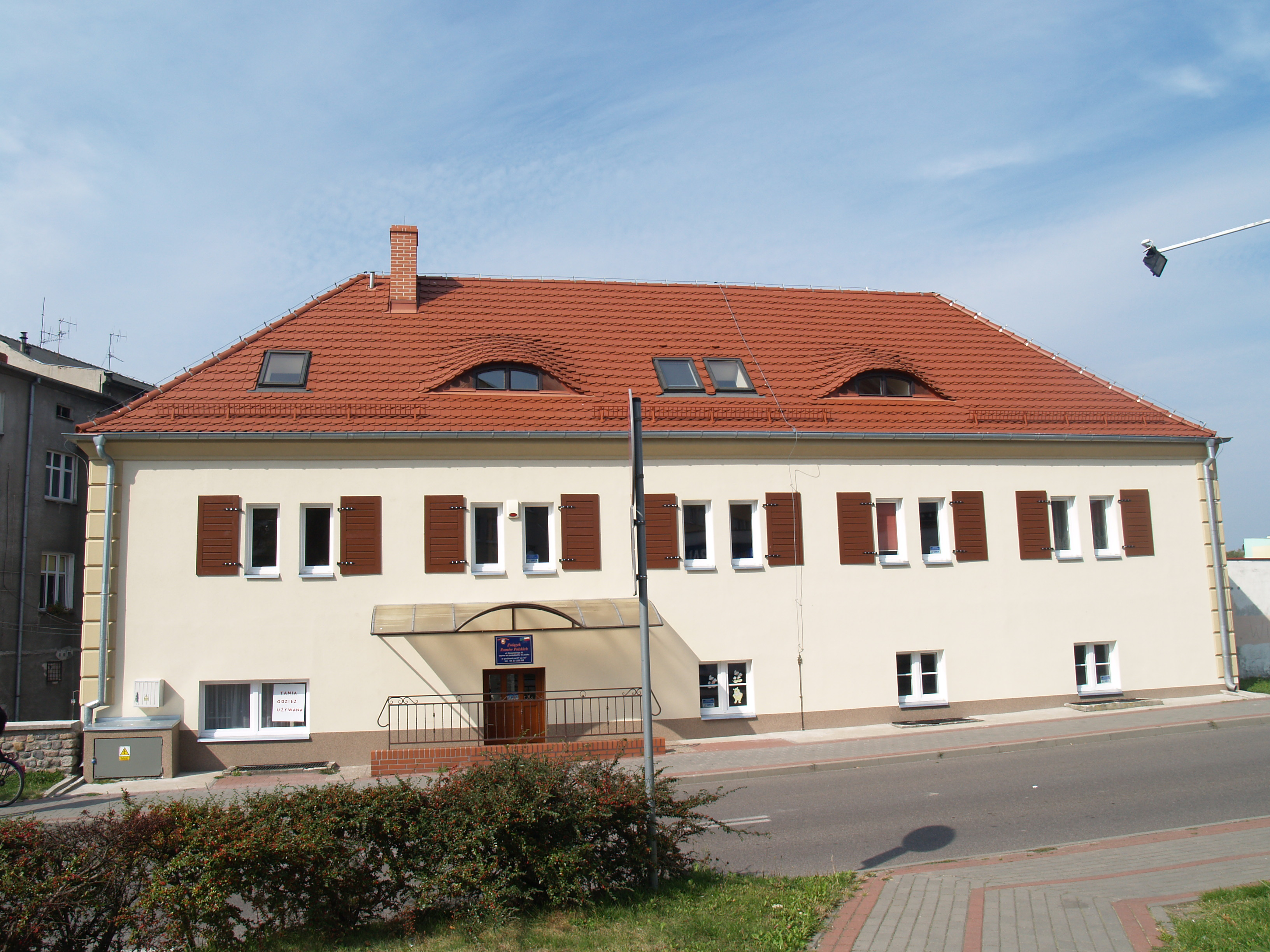 siedziba ZRP